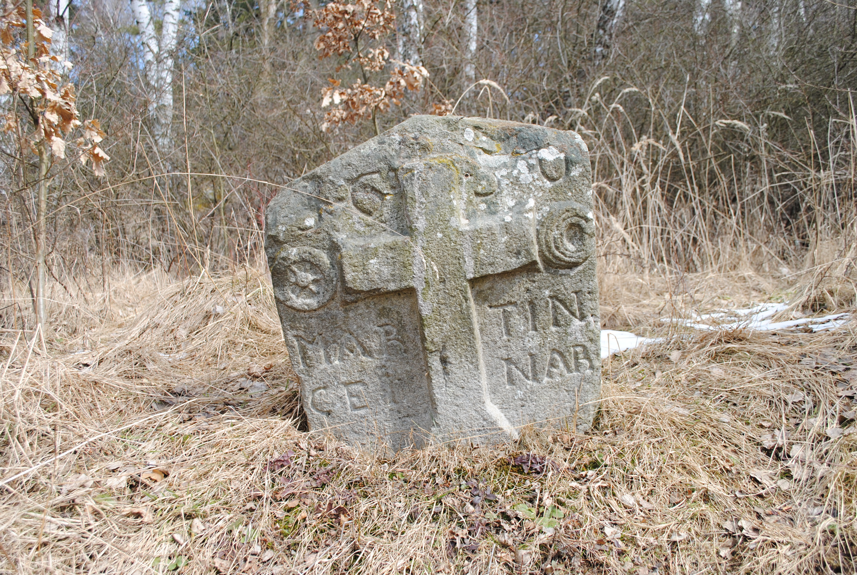 Pamětní kámen (Čenkov), SZ od obce, Čenkov, Čenkov (Třešť).